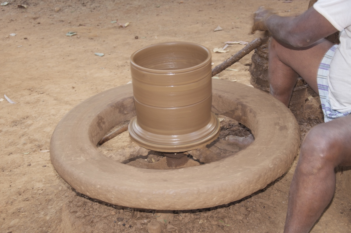 பானை செய்யும் சக்கரத்தில் பாதி முடிக்கப்பட்ட பானையும், அதை செய்பவரும்.